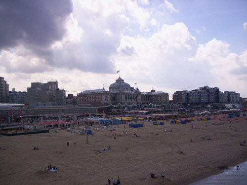 Plage à La Haye, Pays-Bas